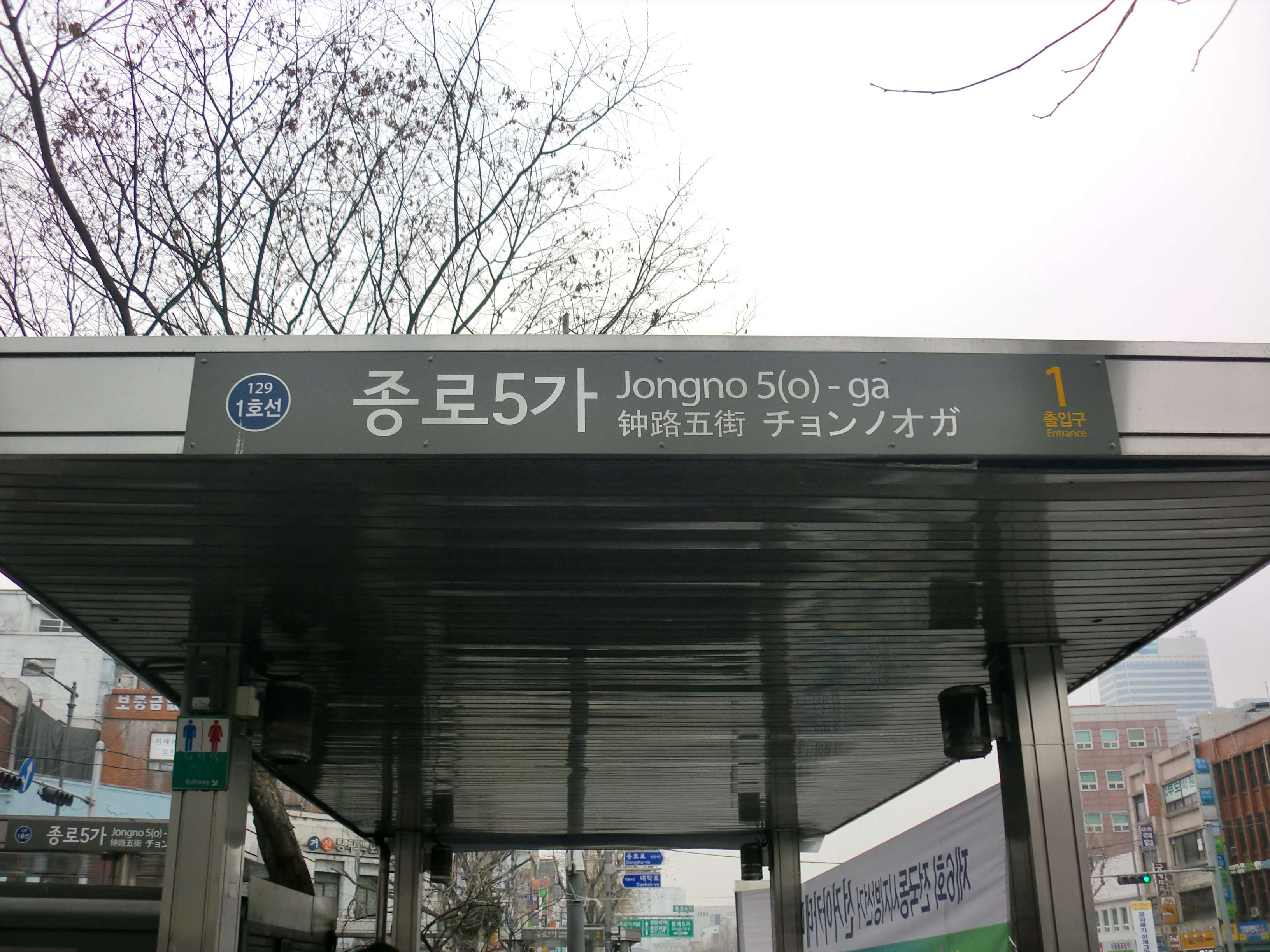 종로5가역 1번출입구